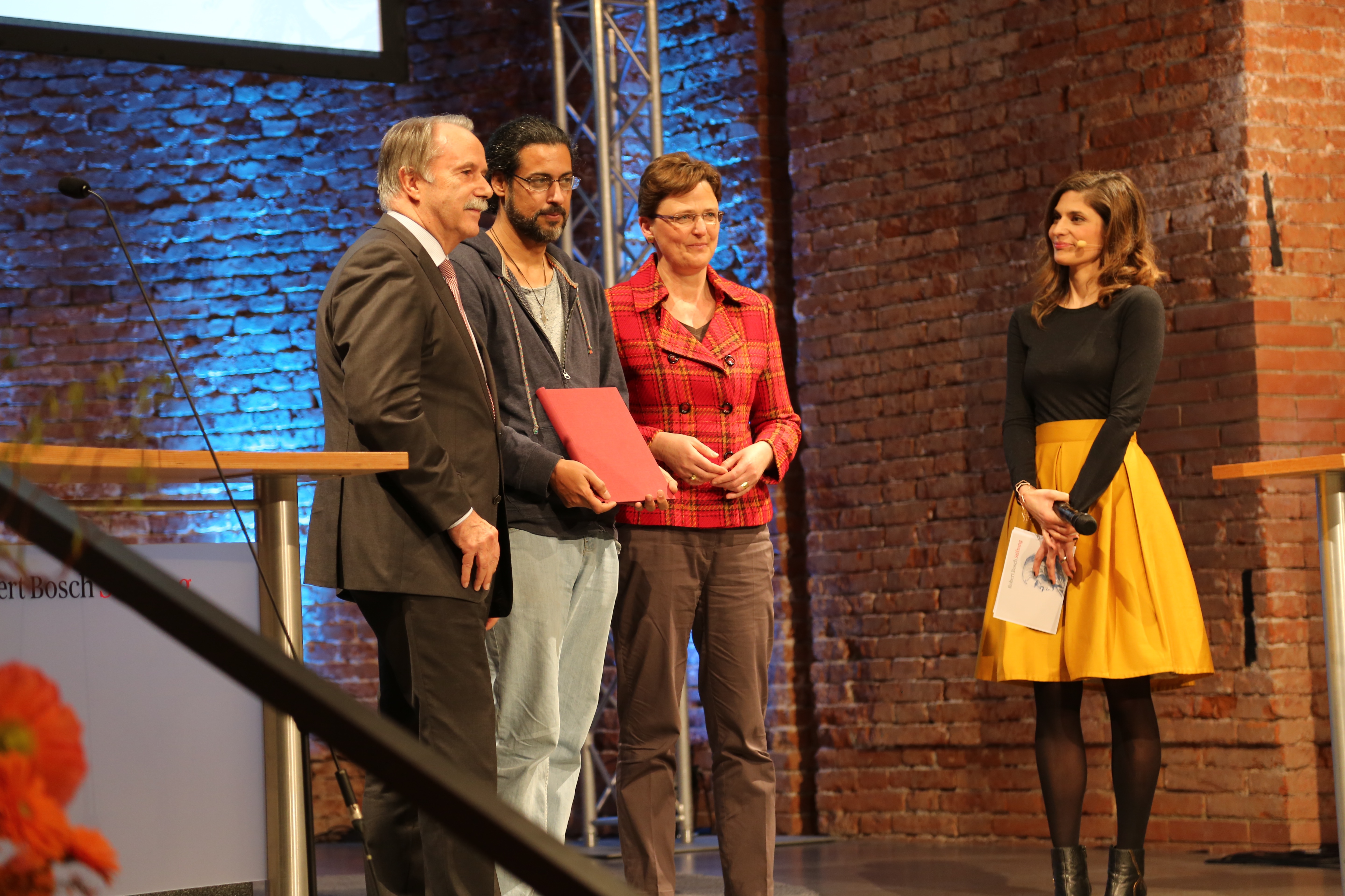 Abbas Khider ist der Preisträger des 33. und letzten Adelbert-von-Chamisso-Preises 2017. (Von rechts: Katty Salié (Moderatorin), Uta-Micaela Dürig (Geschäftsführerin der Robert Bosch Stiftung), Abbas Khider (Schriftsteller) und N.N. (Möglicherweise: Dr. Joachim Rogall (Gechäftsführer der Robert-Bosch-Stiftung). Der Preis wurde in der Münchner Allerheiligenhofkirche verliehen.